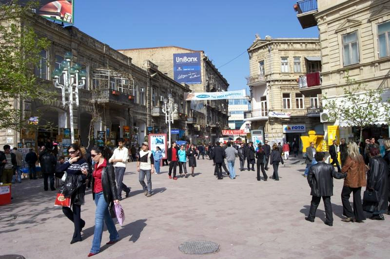 Downtown Baku, Azerbaijan